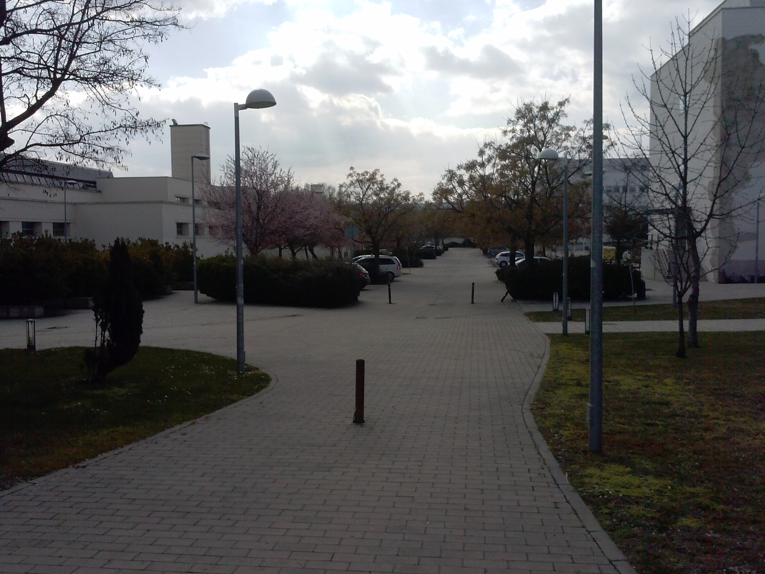 Zona verde y camino entre los edificios del Campus Universitario de Palencia. Universidad de Valladolid.